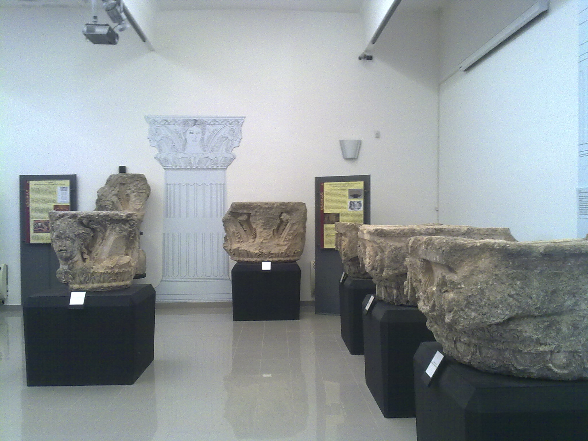 antiquarium canosa di puglia